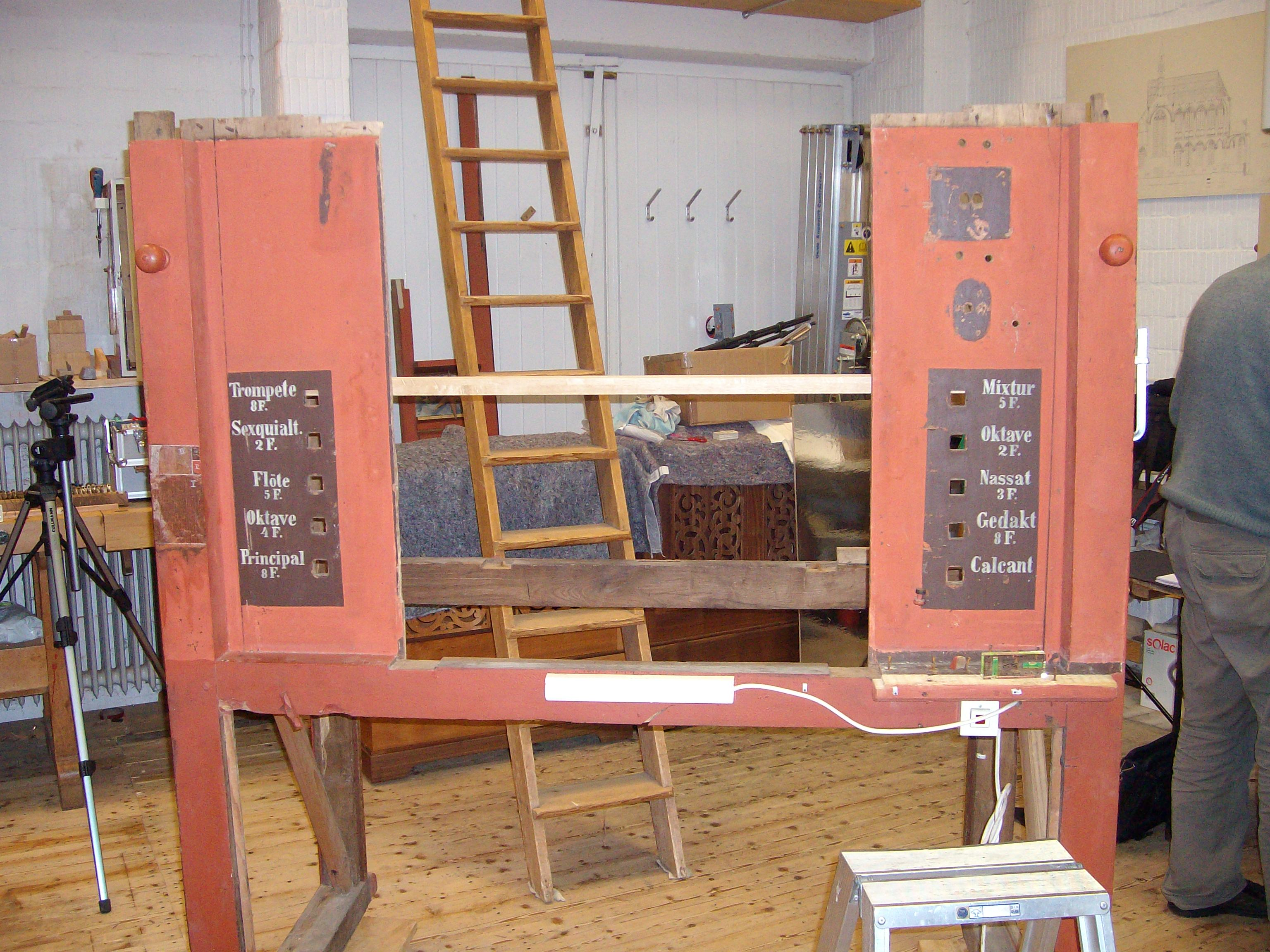 Gehäuse Buttforder Orgel während der Restaurierung bei Ahrend